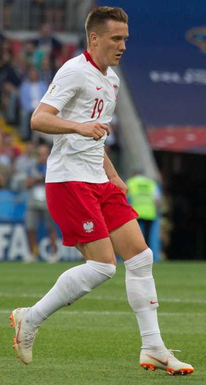 Польша неожиданно проиграла Сенегалу